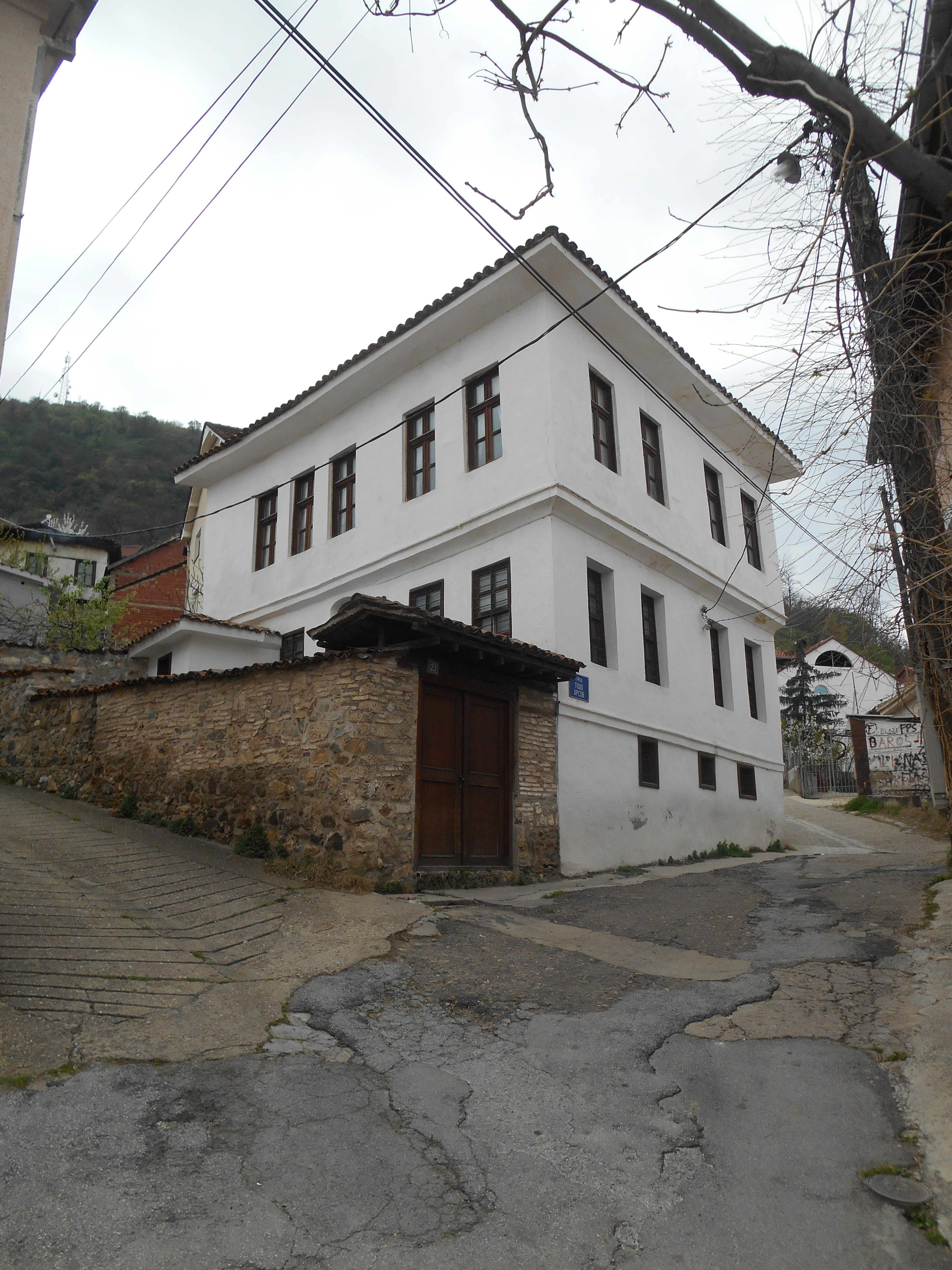 Старата турска пошта